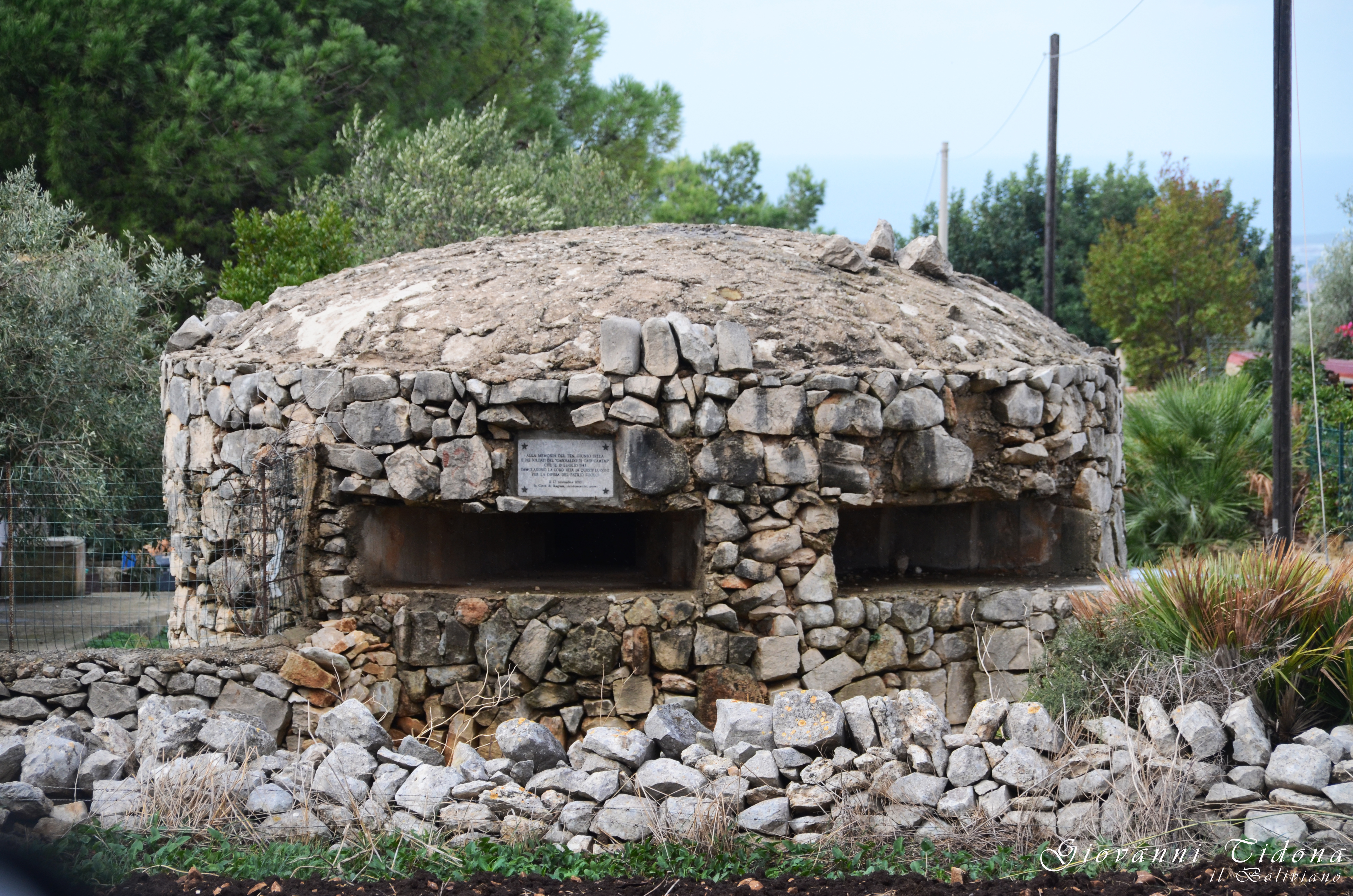 Il fortino con la targa commemorante il ten. Giunio Sella